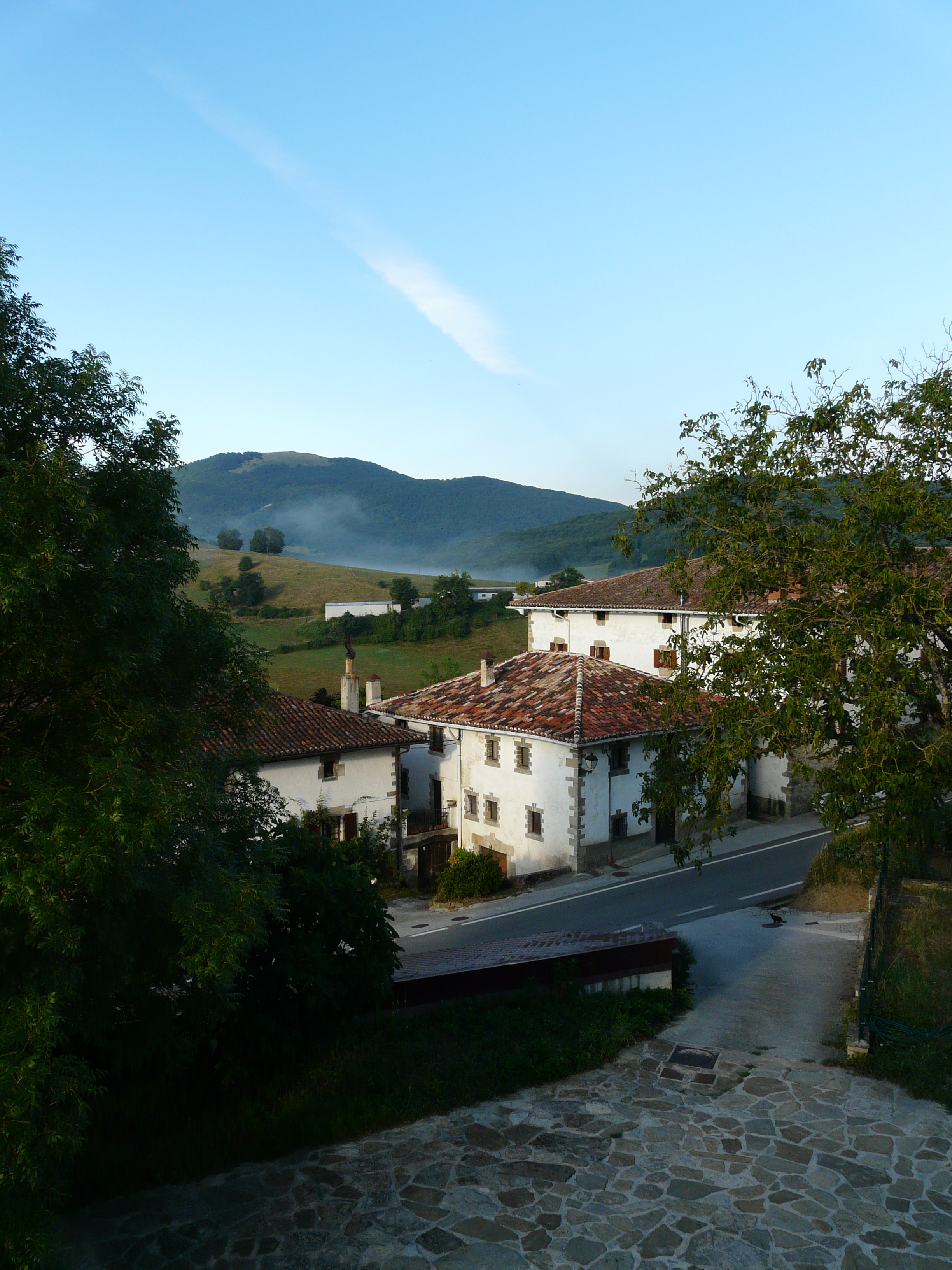 Oskotz (Imotz, Nafarroa)